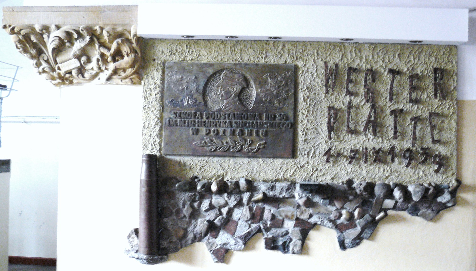 Szkołą przy ul. Słowackiego 54/60 w Poznaniu.